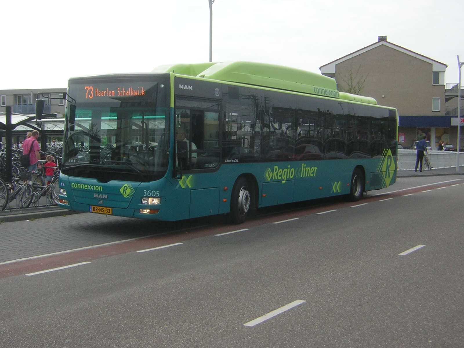 Een nieuwe MAN-bus van Conexxion. Nummer 3605. MAN Lion's City CNG. Licensing Categorie:Afbeelding bus